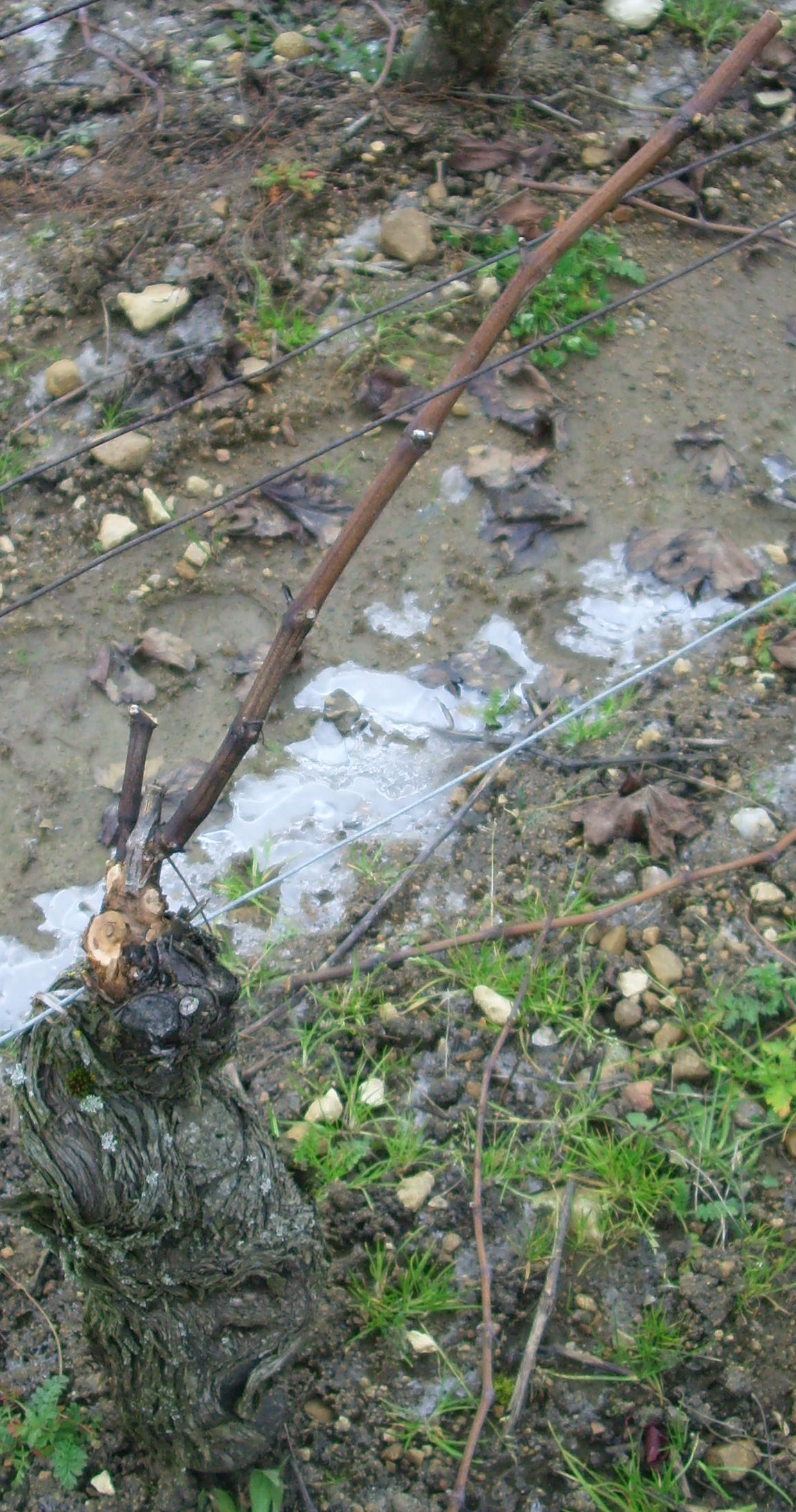 Pied de vigne taillé en guyot simple